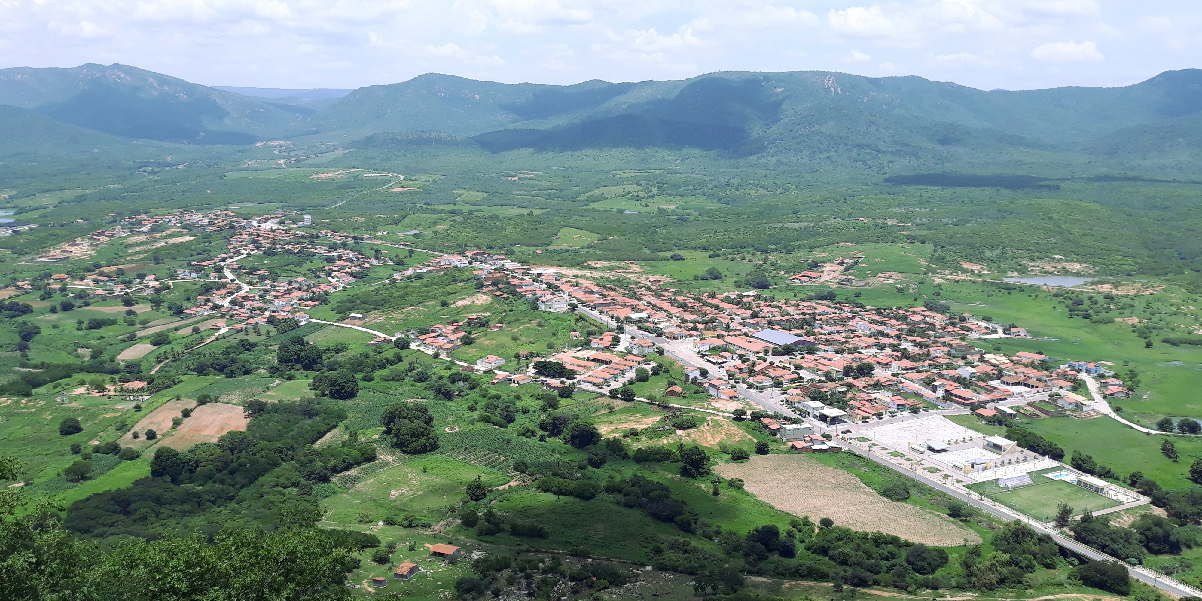 Vista panorâmica parcial da cidade do Encanto, Rio Grande do Norte (Brasil), a partir do mirante do Santuário de São João Batista, no serrote homônimo.